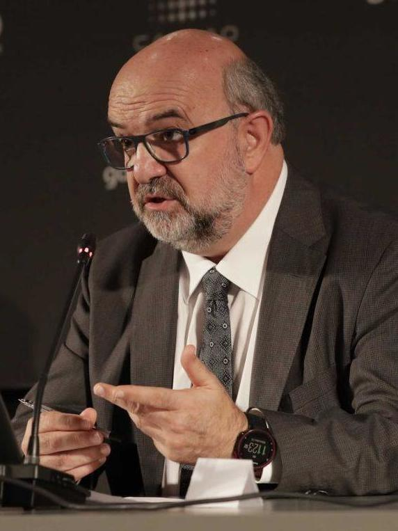 Vuelve por séptimo año, Madrid Premiere Week, el encuentro de cine que traerá del 6 al 9 de noviembre los principales estrenos de la temporada a los cines Callao. El Ayuntamiento de Madrid se suma a esta cita en su apuesta por hacer del cine una de las señas de identidad de la ciudad. Luis Cueto, coordinador general de Alcaldía ha presentado hoy las novedades de esta nueva edición junto con Mikel Lejarza, presidente de Atresmedia Cine; María Luisa de la Peña, responsable de Marketing de Gas Natural Fenosa; María Rubín, responsable de Cine Español de Movistar+, y Carlos Esbert, director artístico de TAI.